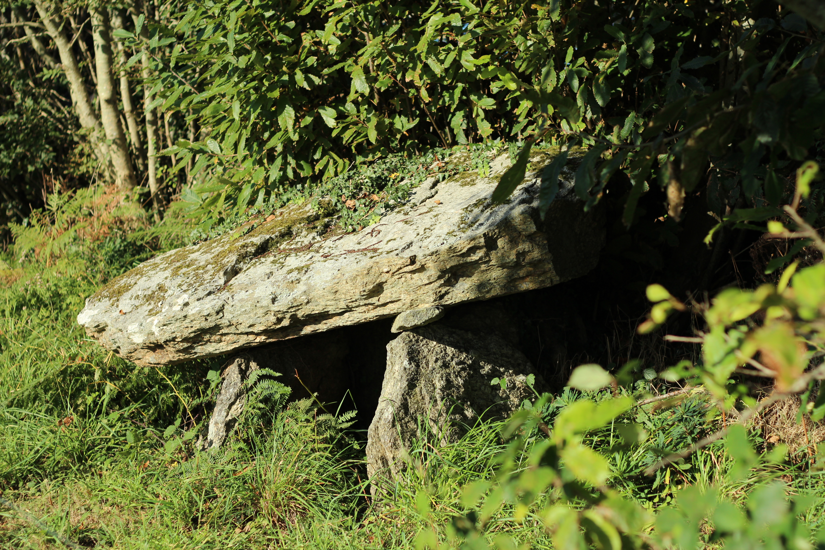 Dolmen de Benon Parc-Goalichot, commune du Trévoux, Finistère, Bretagne, France. .